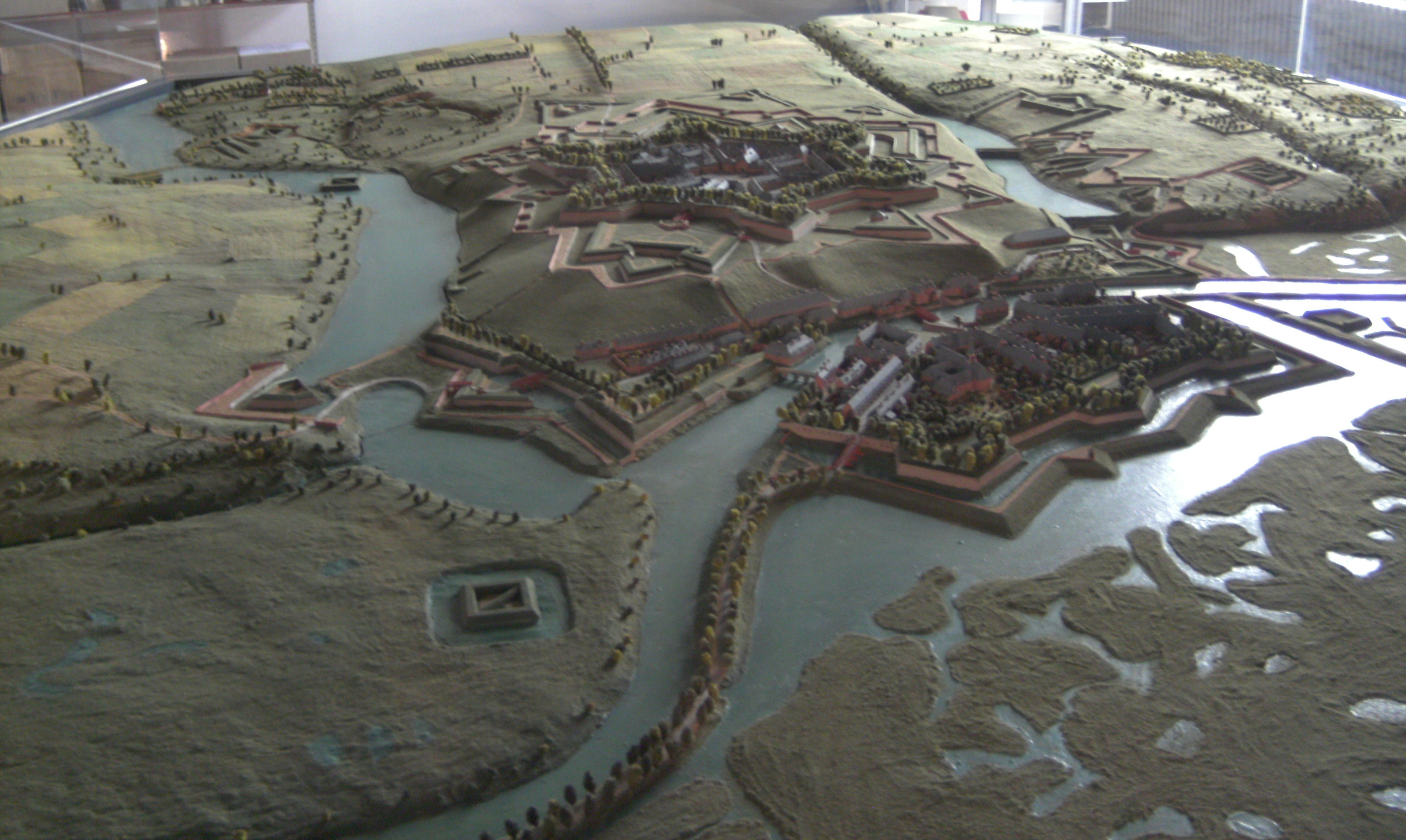 Charleroi (Belgique) - Plan-relief conservé à l'Hôtel de ville de Charleroi. C'est une copie de l'original datant de 1696 qui se trouve au Palais des beaux-arts de Lille. Photo prise depuis le sud-ouest. Ouvrage consacré au plan-relief de Charleroi : Maurice-A. Arnould, Le plan en relief de Charleroi, Bruxelles, Crédit Communal, coll. « Histoire in-4° », 1986, 68 p. (ISBN 2-87193-006-6)